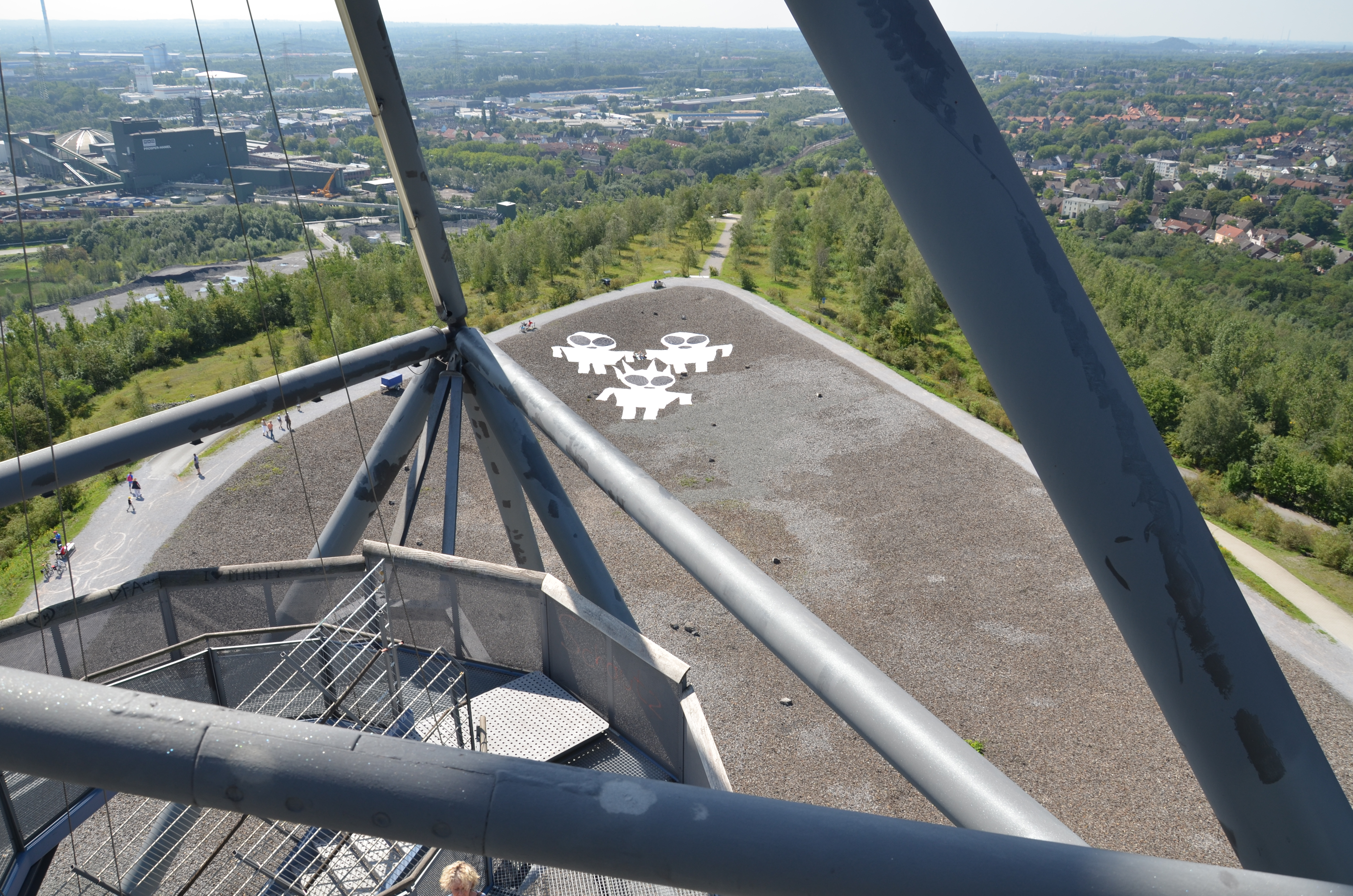 Die Aliens des Künstlers Fred Fischer kehren temporär auf die Halde Beckstraße (Bottrop) unterm Tetraeder zurück. Diesmal mit Zustimmung des RVR und aus Textilbahnen geformt.